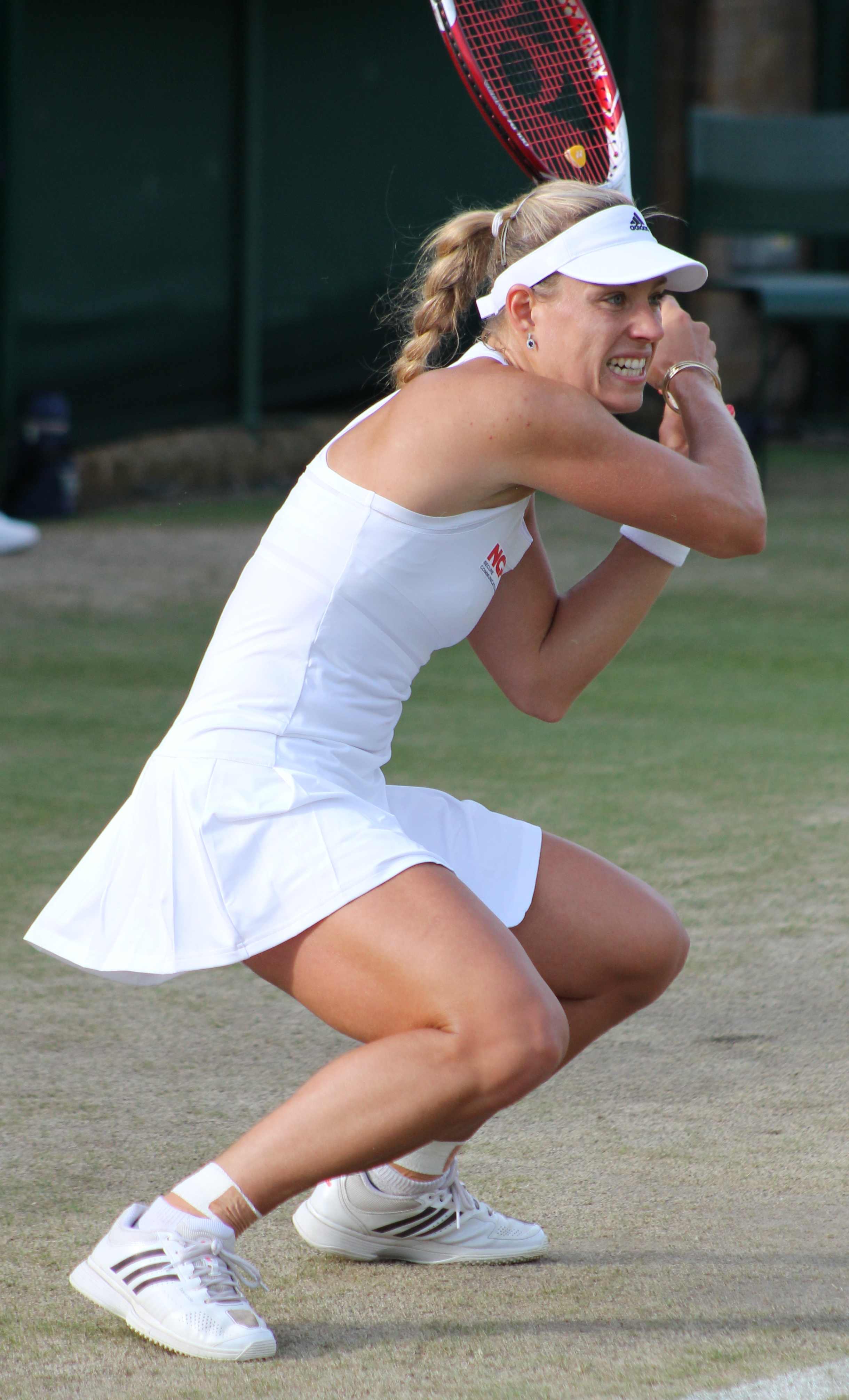 Kerber WM14 (9)